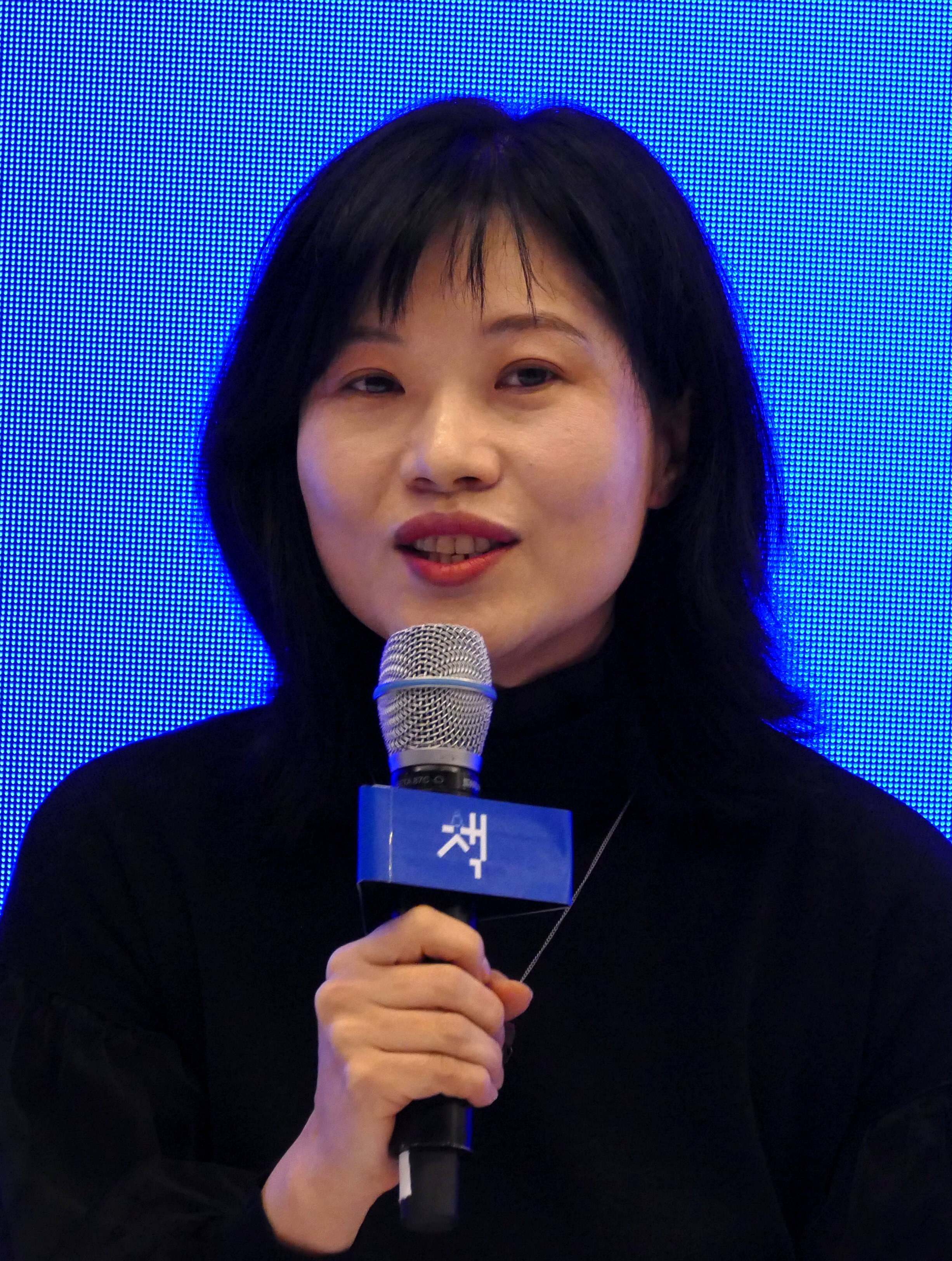 Kim Haengsook på Bokmässan i Göteborg 2019.